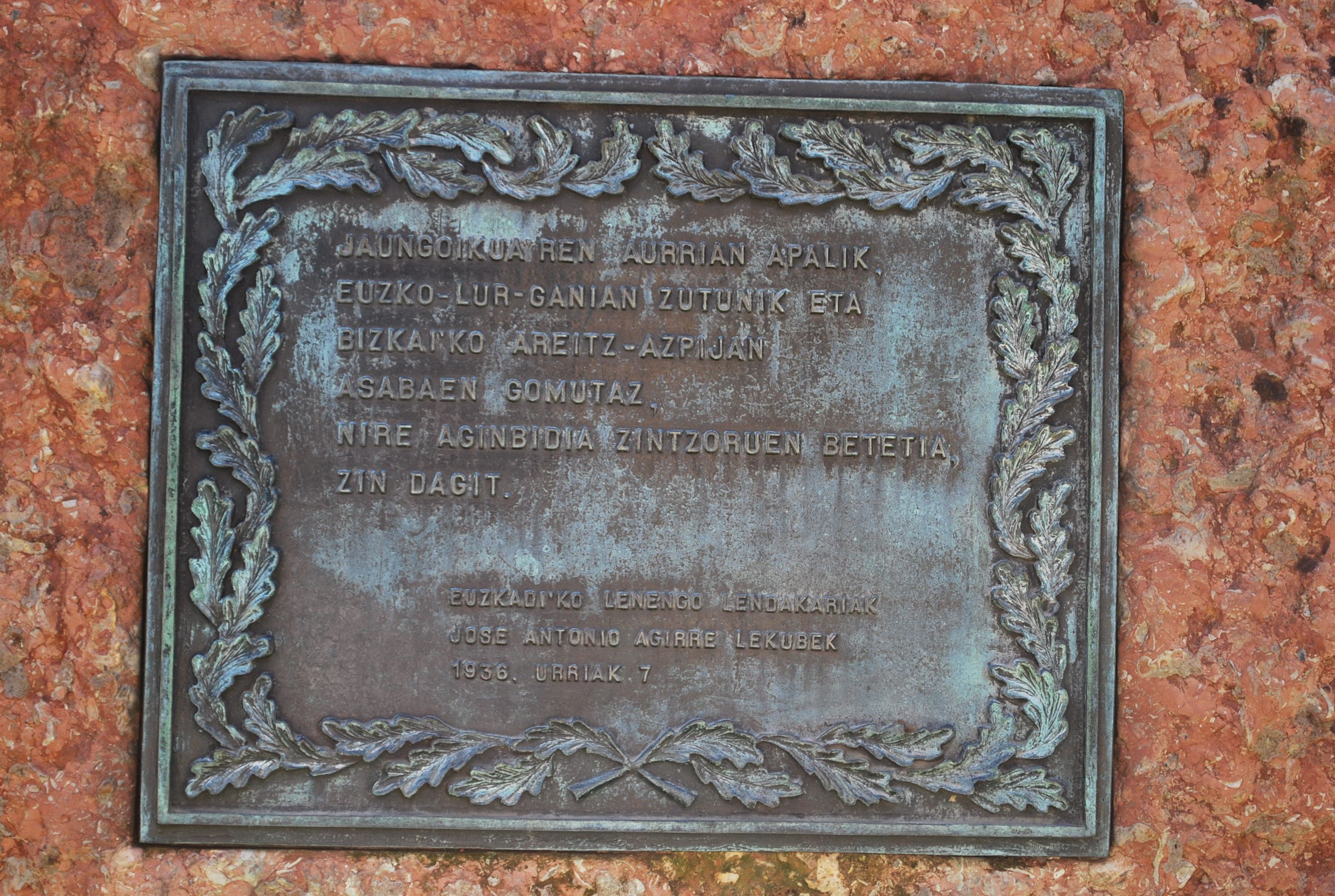 Extrait du serment du premier Lehendakari au Parlement foral de Biscaye à Gernika (Biscaye). Il servira de modèle à tous ceux à venir.